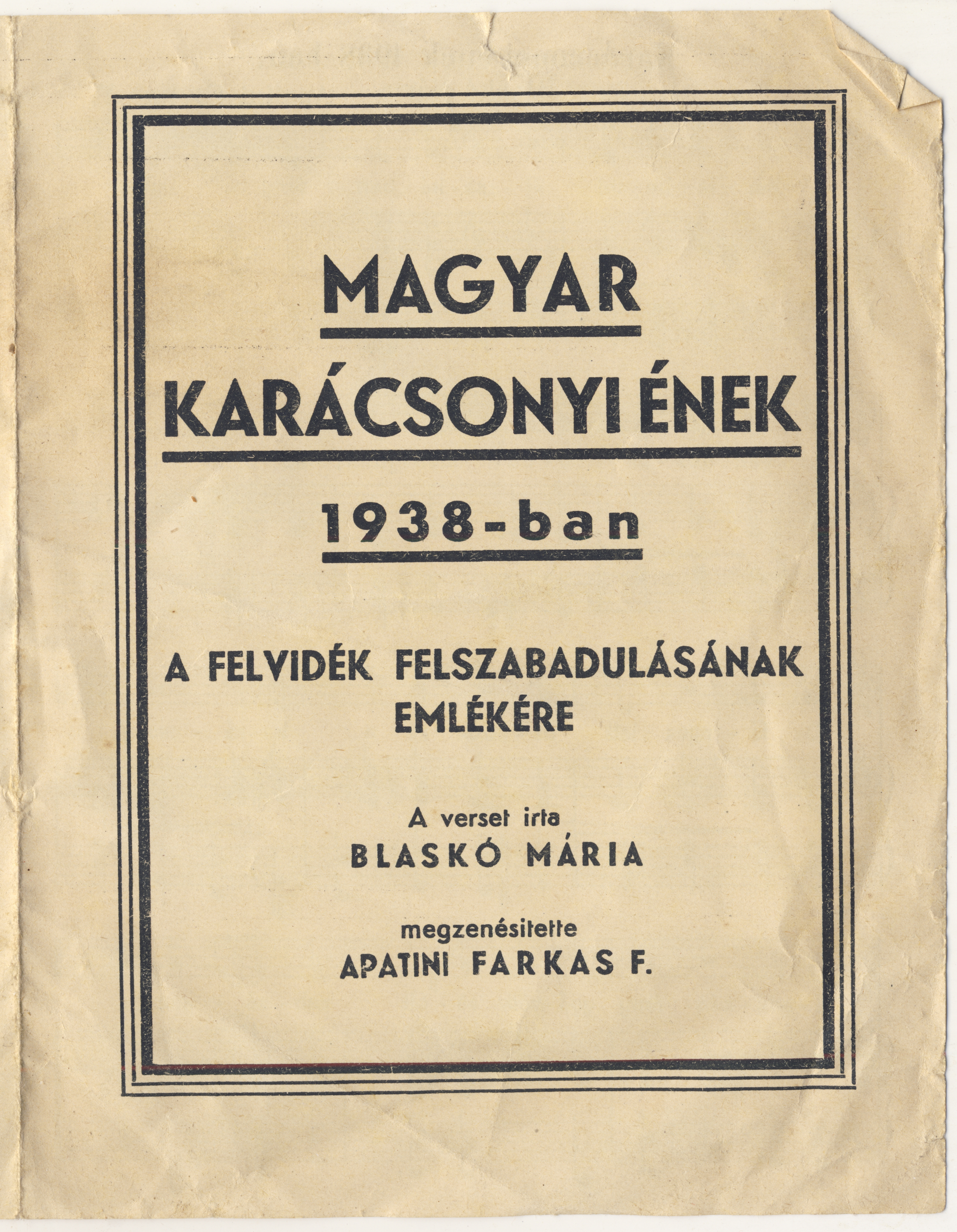 Magyar Karácsonyi Ének